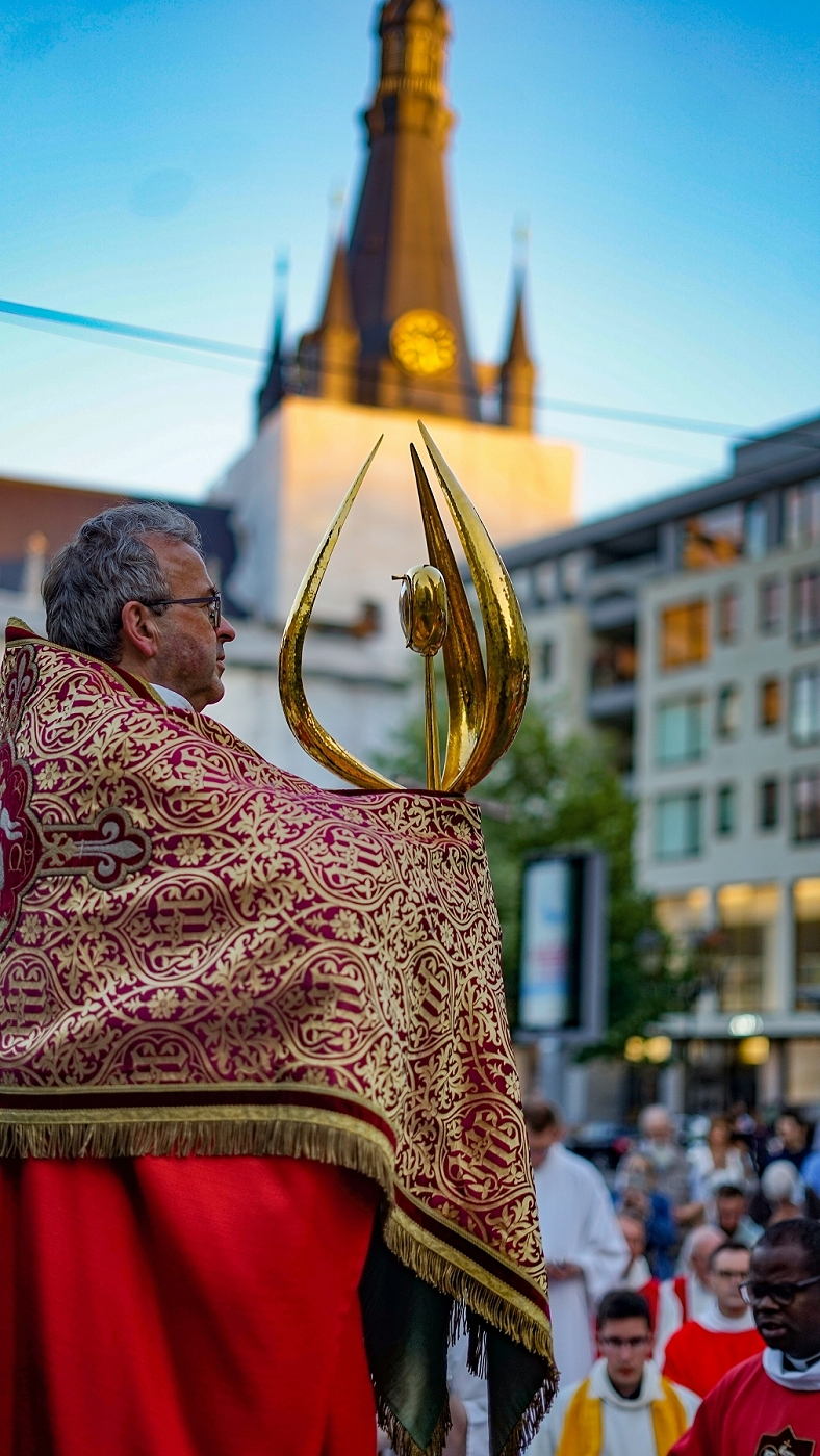 Mgr Harrie Smeets évêque de Roermond et le Saint-Sacrement devant la Cathédrale Saint Paul de Liège lors de la procession de la Fête-Dieu à Liège le 20 juin 2019.